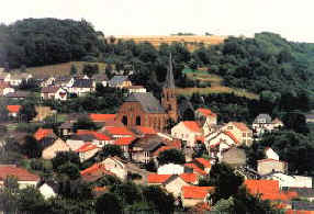 Blick vom Kohlhof auf Gresaubach